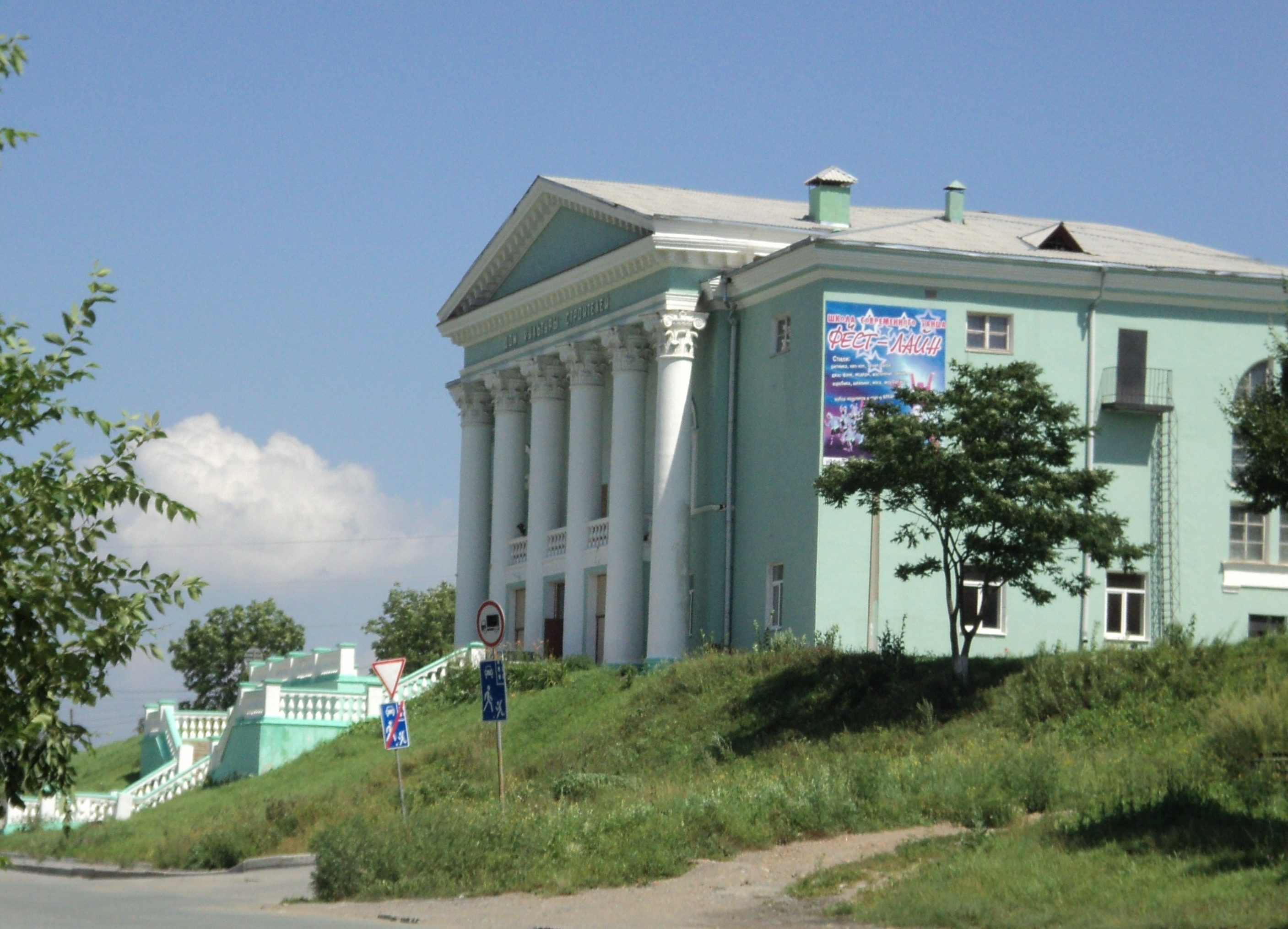 Муниципальный дом молодежи в Находке